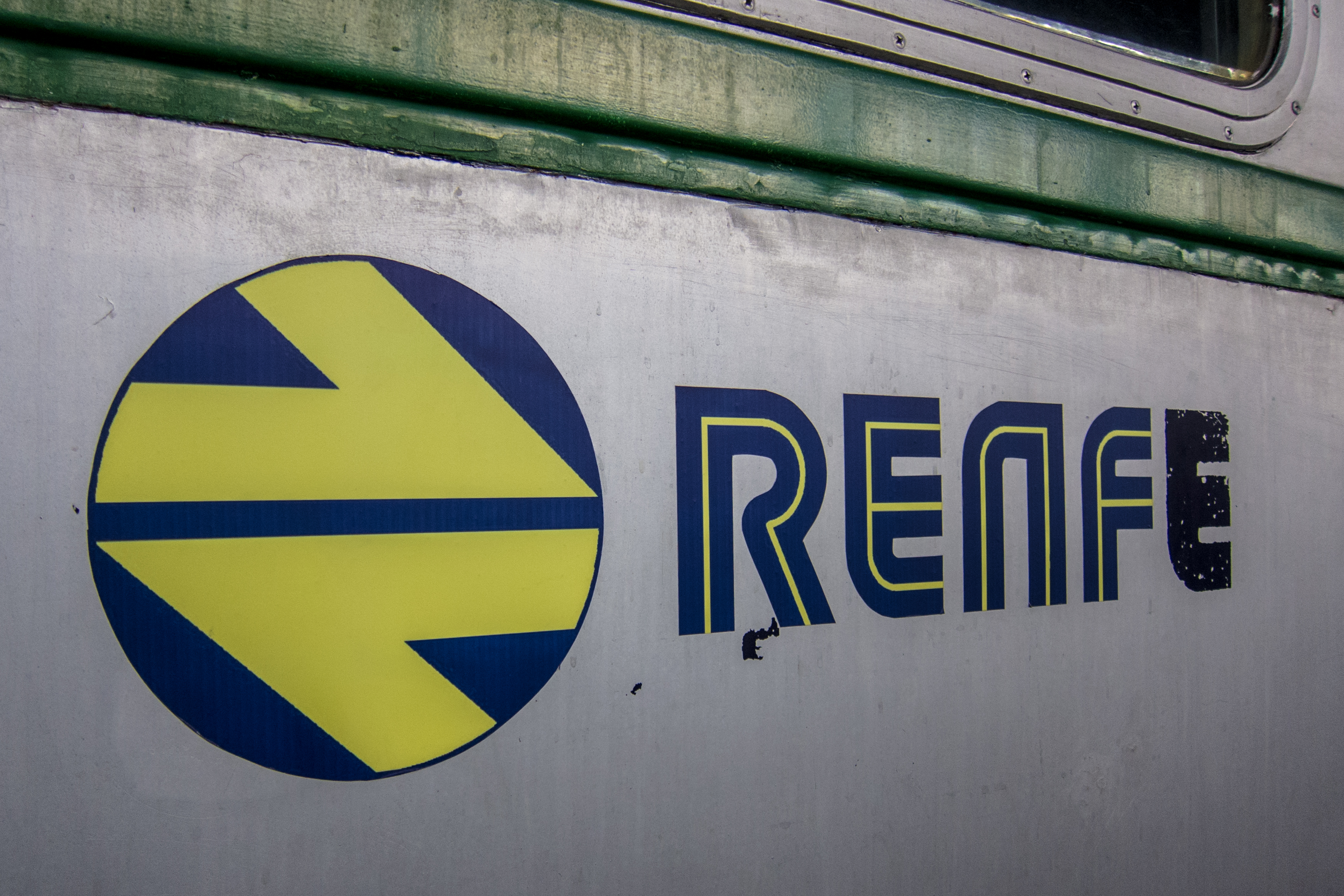 Logo de RENFE en el tren automotor TAF 9522 (Fiat, Italia, 1952) Expuesto en el Museo del Ferrocarril, Madrid.